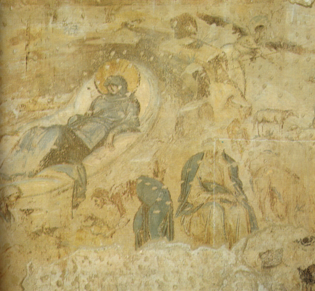 Maestro di castelseprio, natività